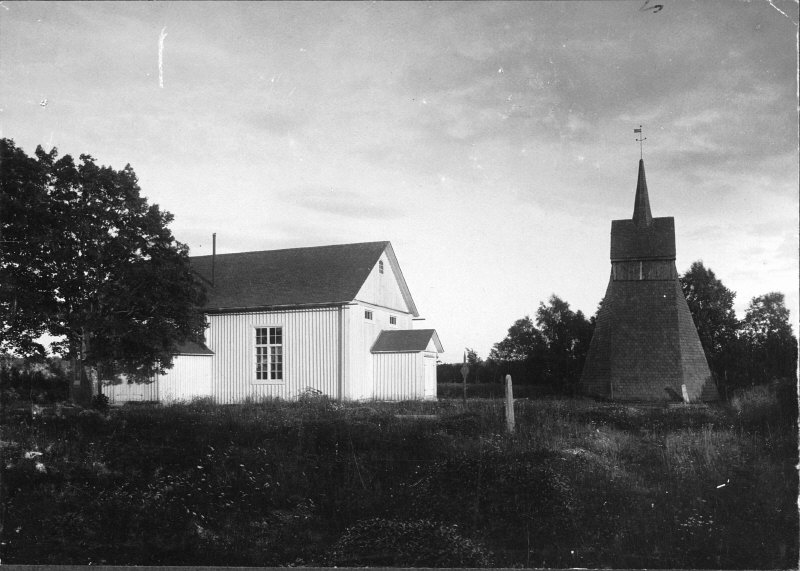 Kyrkan och klockstapeln från norr. Kategori: (01) ExteriörerKyrkan och klockstapeln från norr.